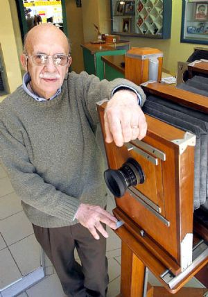 Luis Victorino Savelli en su estudio fotográfico, 2007